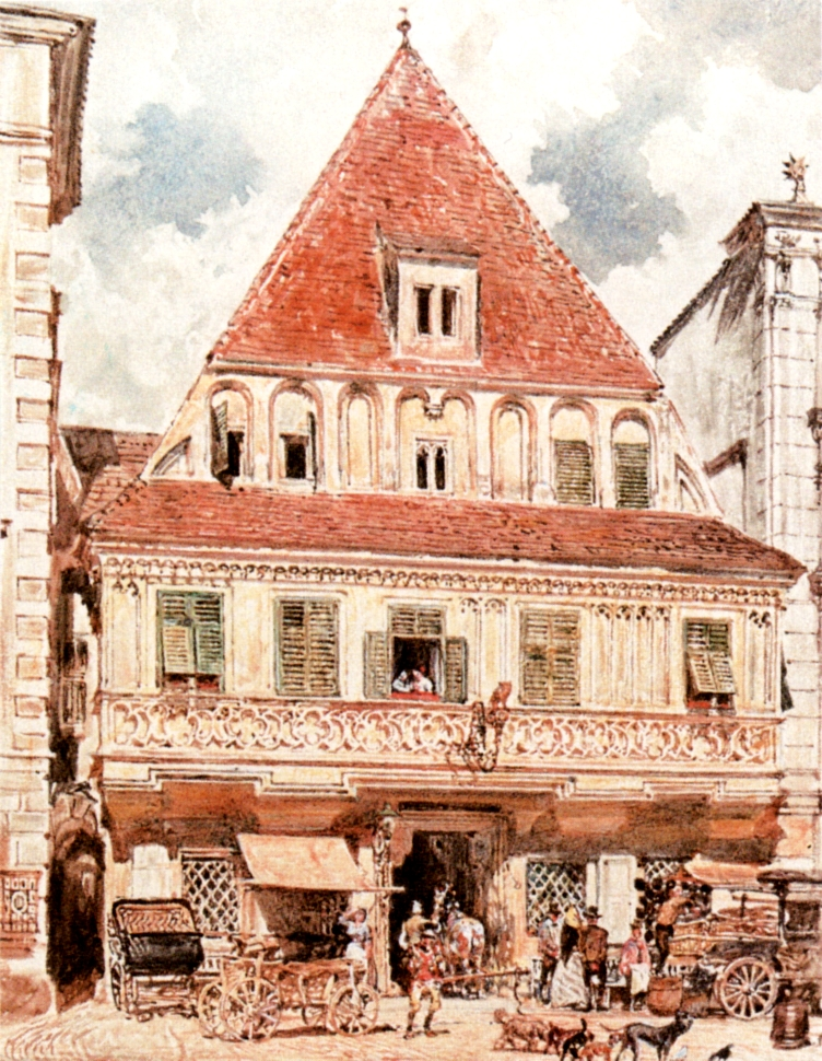 Das gotische Bummerlhaus am Steyrer Stadtplatz